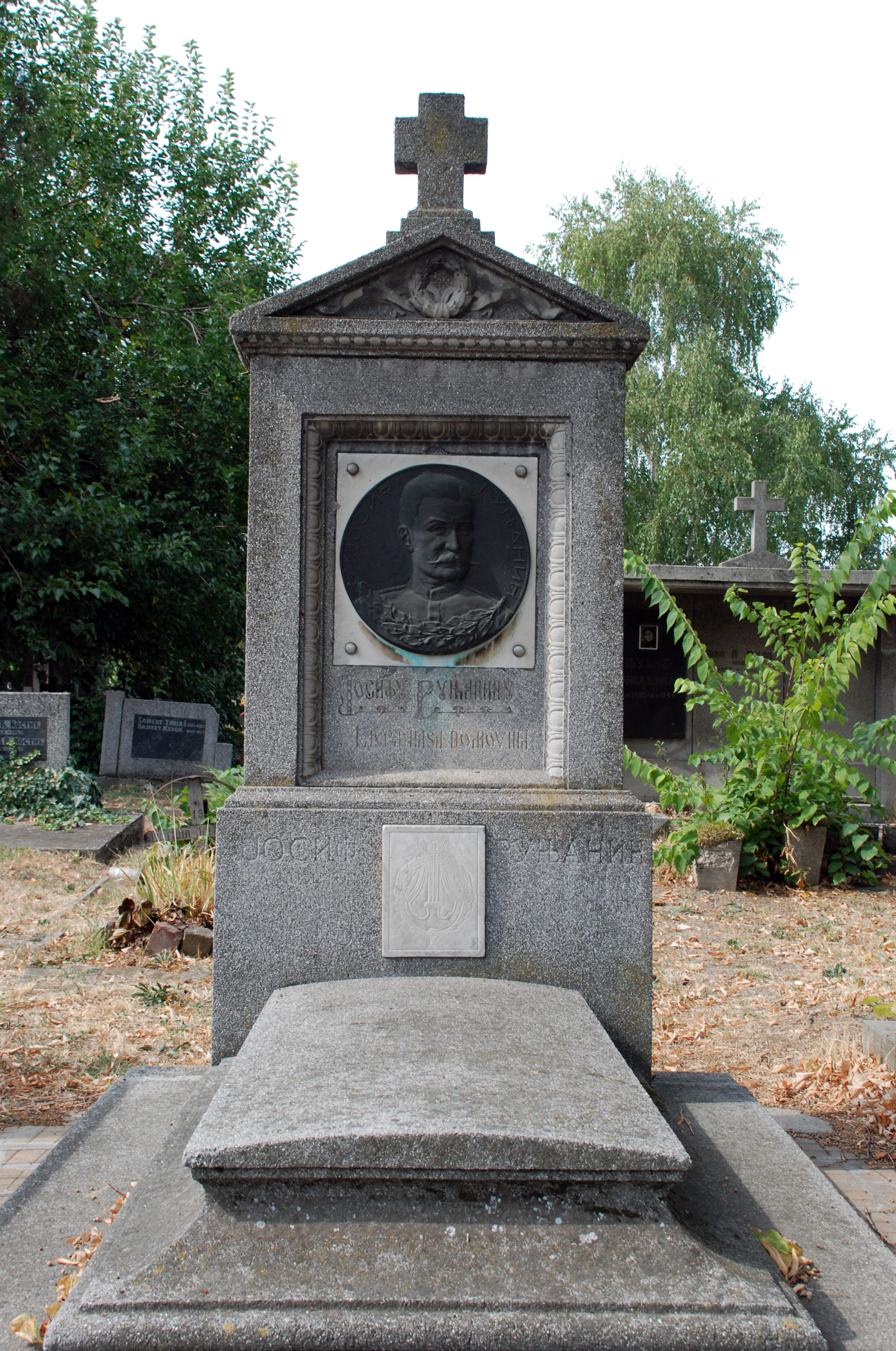 1821-1871, официр и композитор, компоновао хрватску химну и једну песму Ивана Трнског.